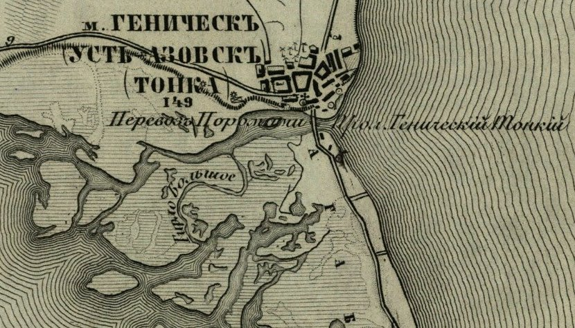 Генический пролив. Фрагмент карты работы Ф. Ф. Шуберта. Из комплекта топографических карт Таврической губернии. 1860-1890 гг. Масштаб: 3 версты в дюйме. (1 см-1260м) .(1:126000)